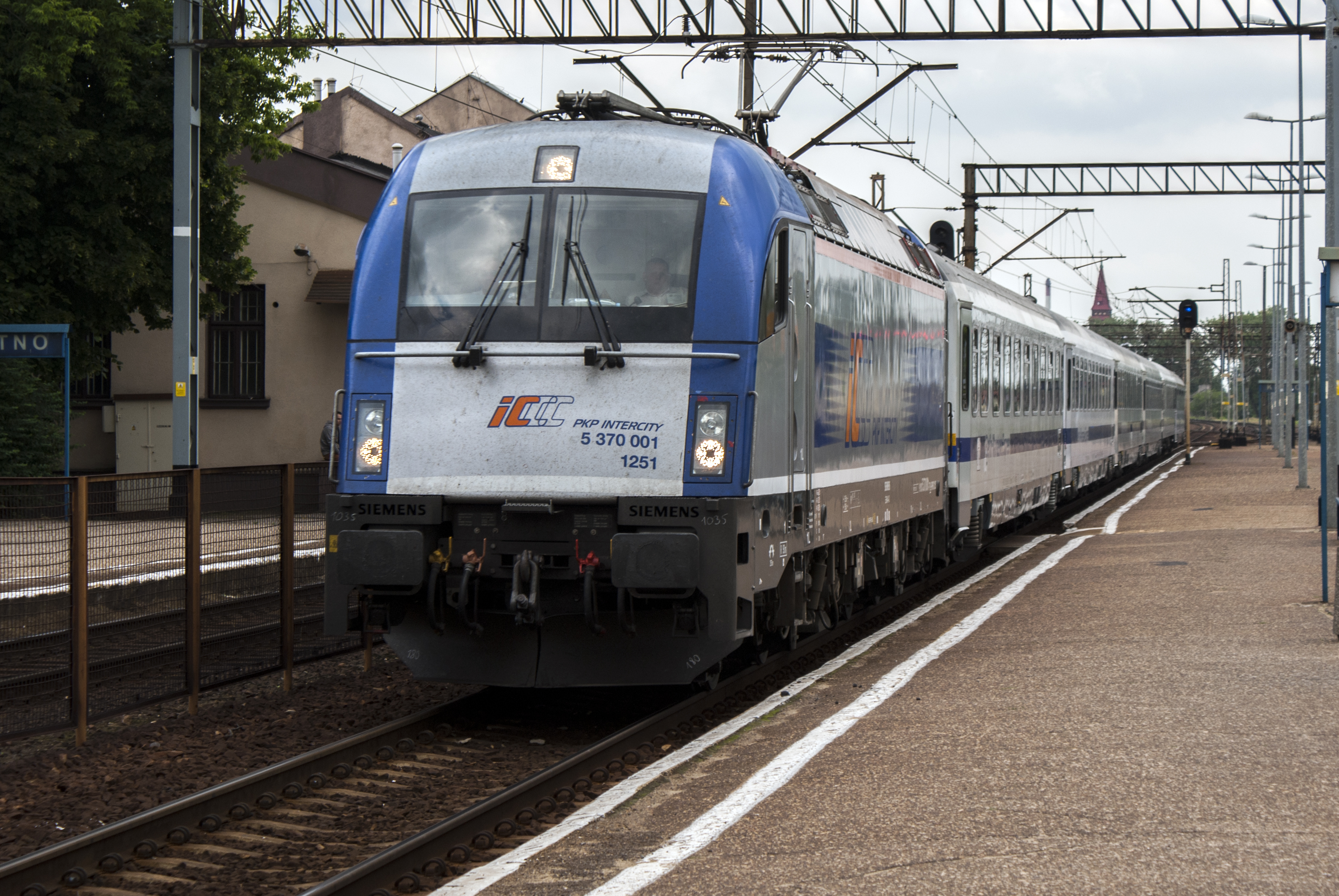 Berlin-Warszawa-Express hamuje na stacji w Kutnie.